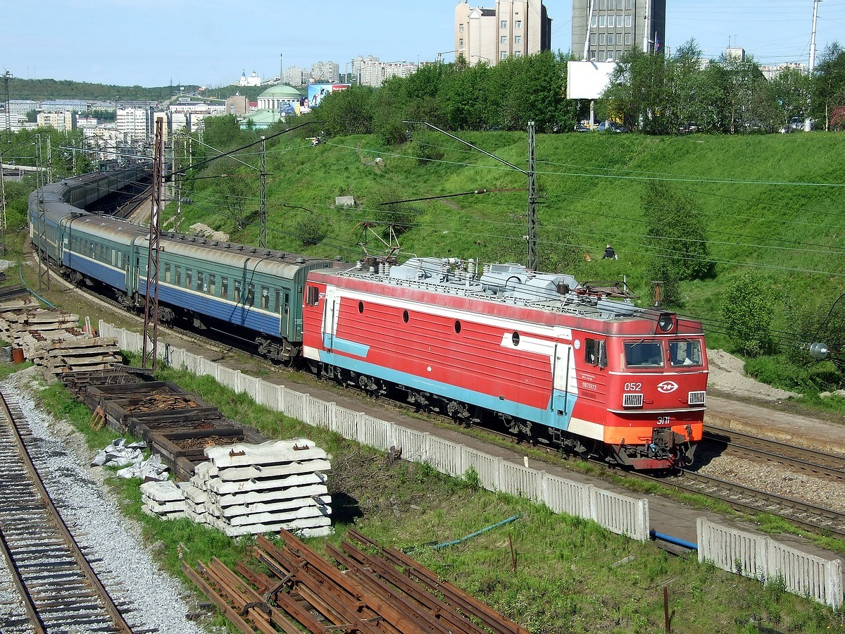 С завода поступил в депо Кемь СР Новосибирский ЭРЗ 09.2012 г, замена МСУД и переделка схемы под высокий номер ТР-3 СЛД Россошь 04.2017 г.